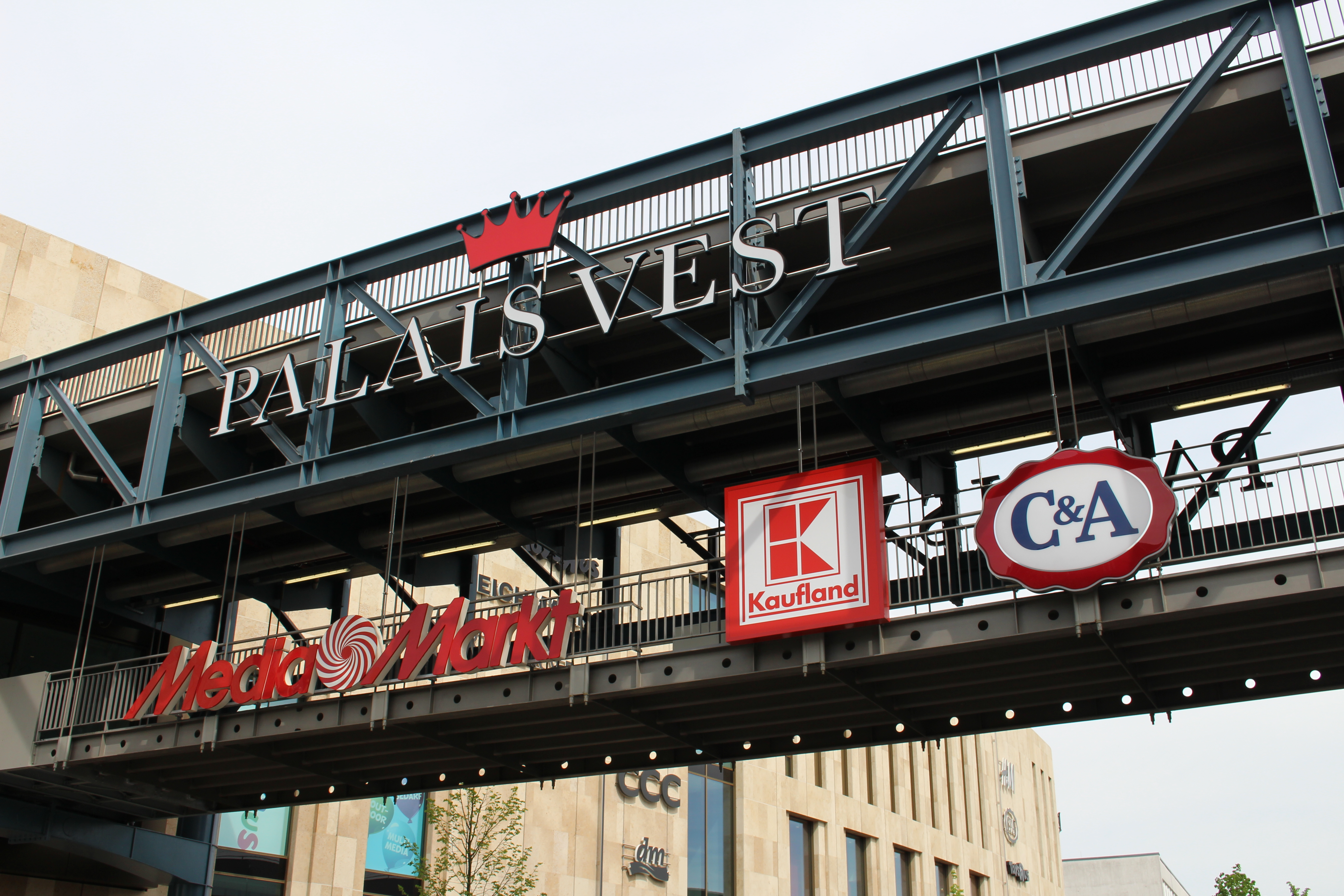 Verschiedene Arten und Größen von Leuchtreklamen. Brücke am Palais Vest über den Kaiserwall, Recklinghausen.